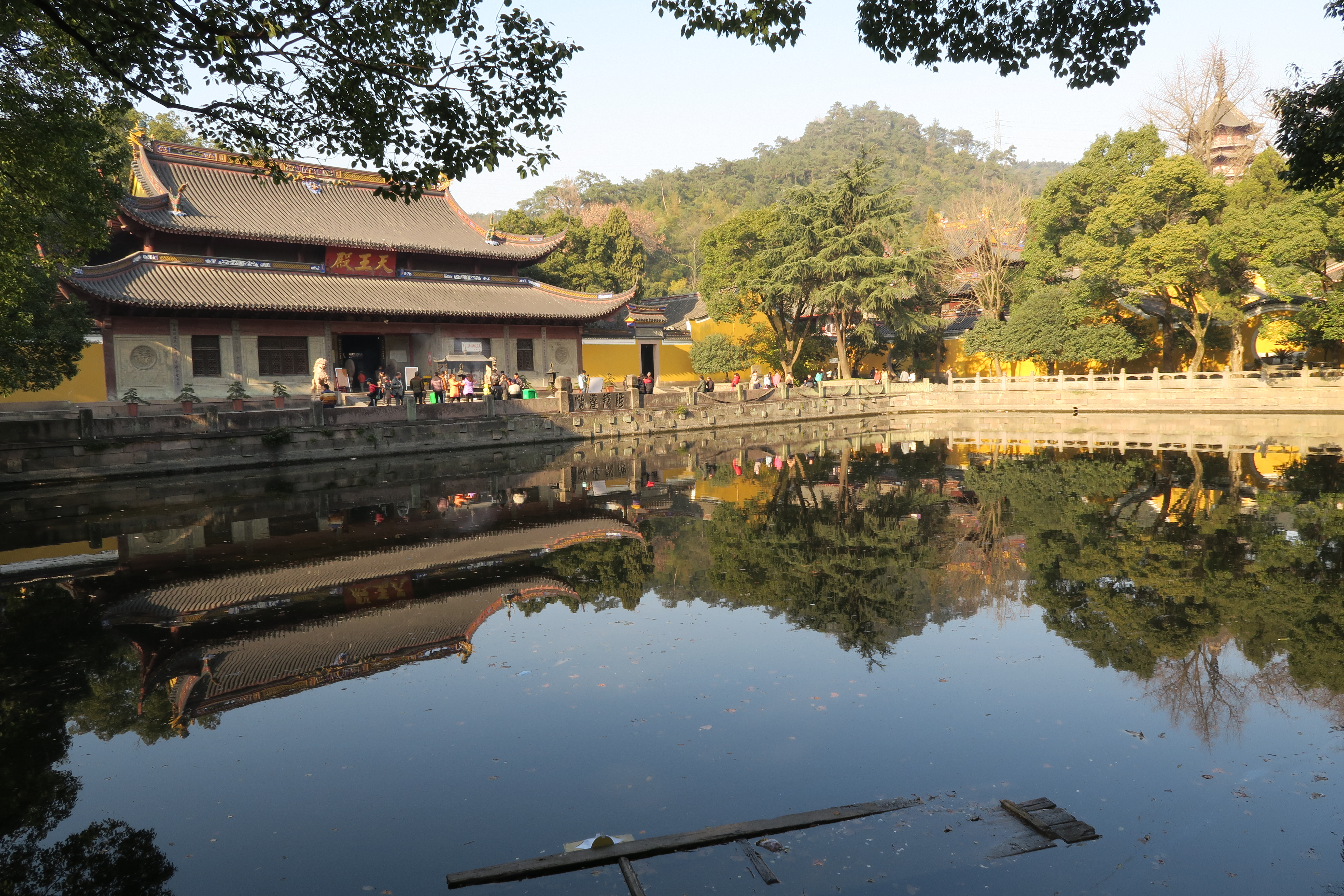 宁波阿育王寺